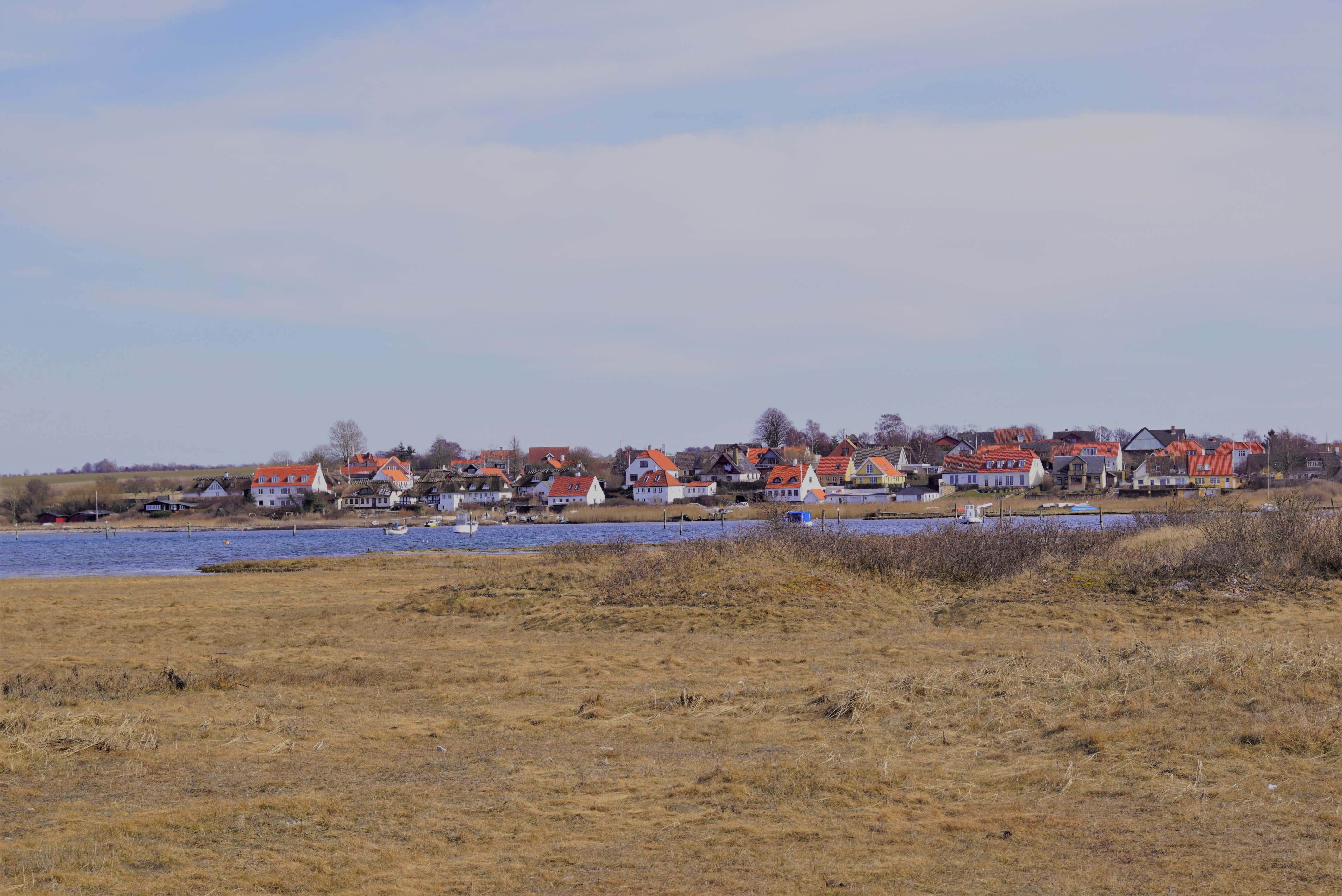 Torø Huse set fra Torø